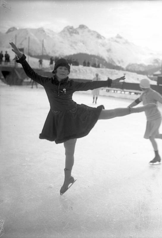 Die Norwegerin Sonja Henie Eislaufweltmeisterin 1931! Die langjährige Eiskunstlauf-Weltmeisterin Sonja Henie errang im Berliner Sportpalast die Weltmeisterschaft für 1931.